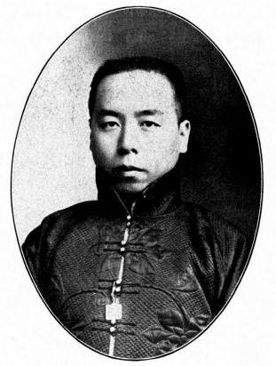 中文（台灣）: 中華民國國會議員